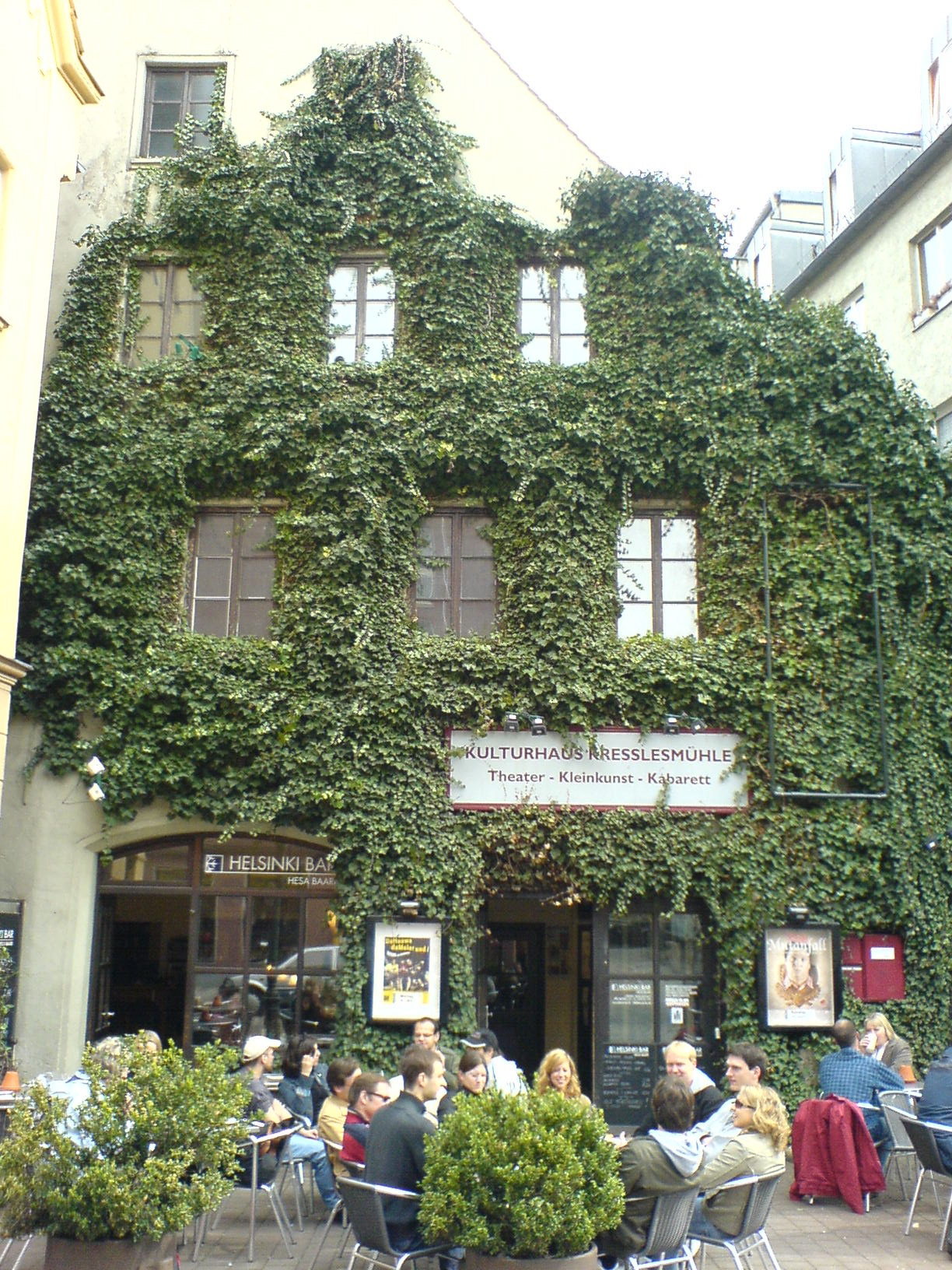 Das Kulturhaus Kresslesmühle in der Augsburger Altstadt